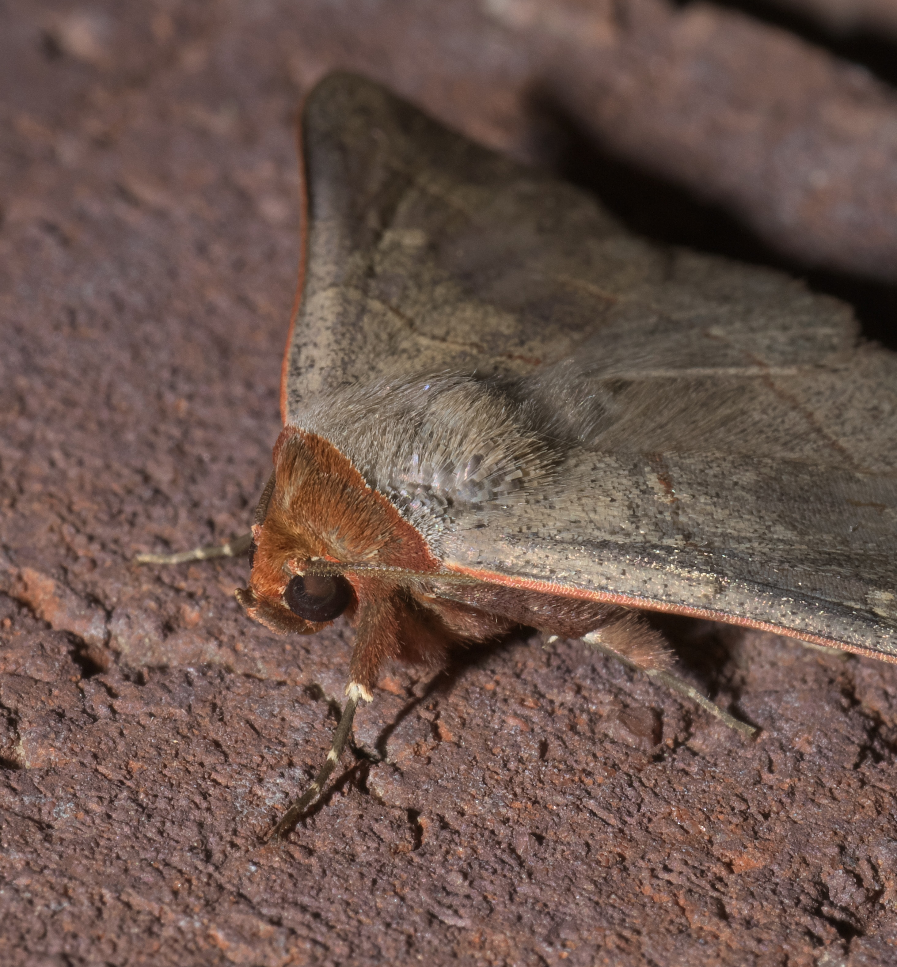 Panopoda rufimargo, Red-lined Panopoda - Hodges #8587, ID Confidence: 87